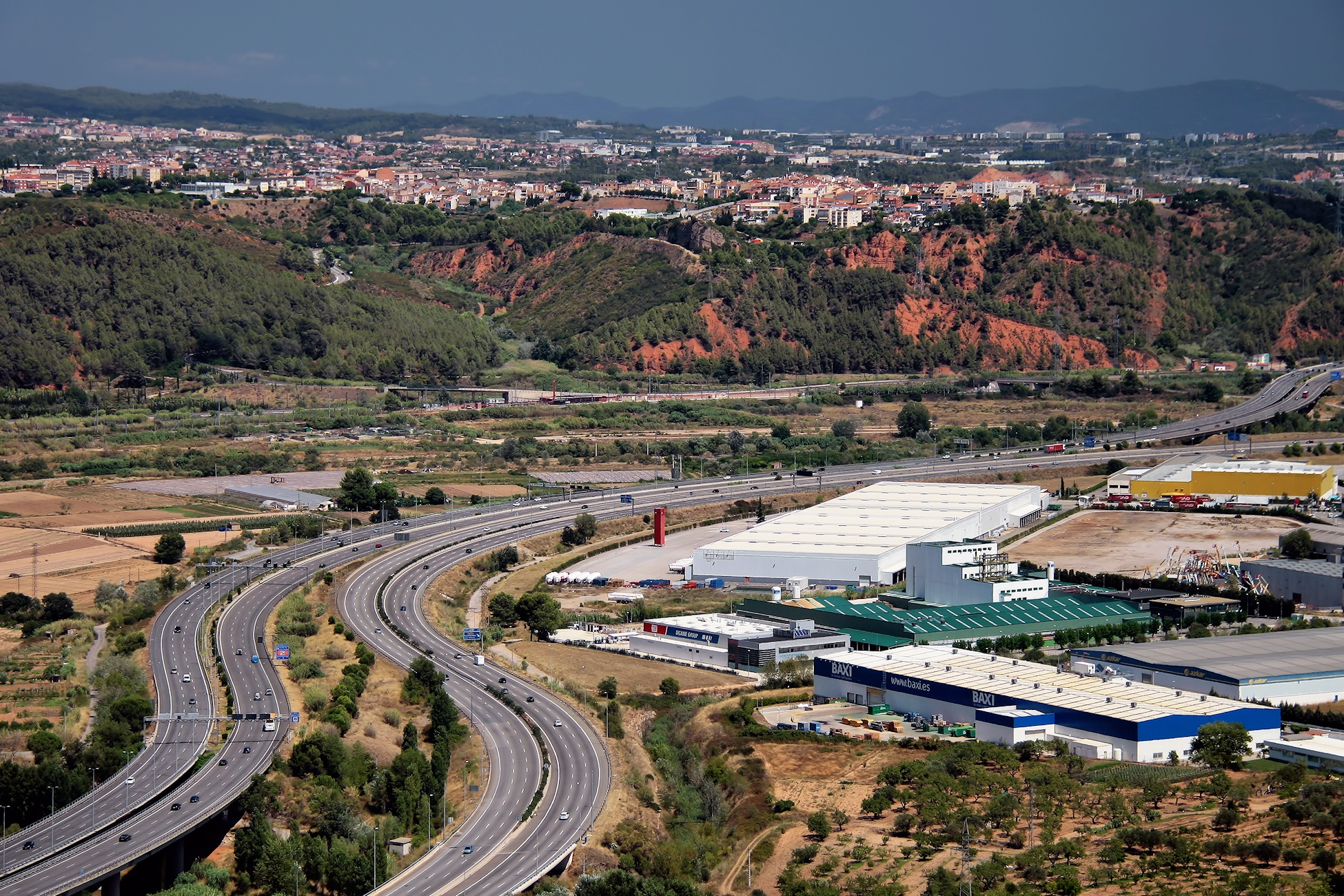 Autovía A-2 y autopista AP-7